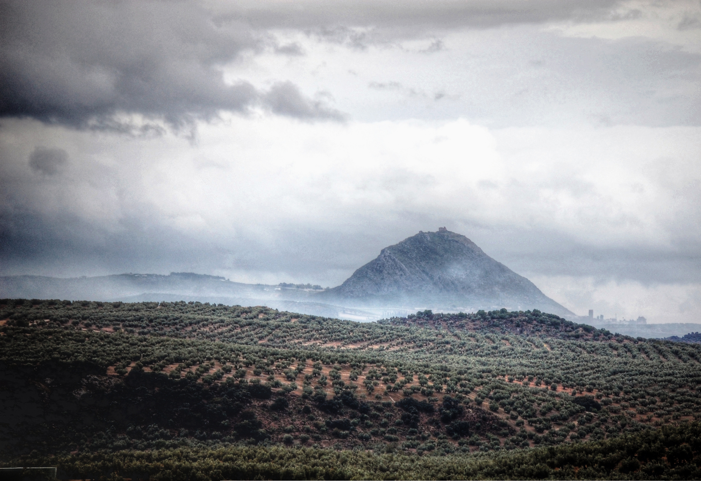 Vista general de la Peña de Martos con la ciudad a sus faldas.